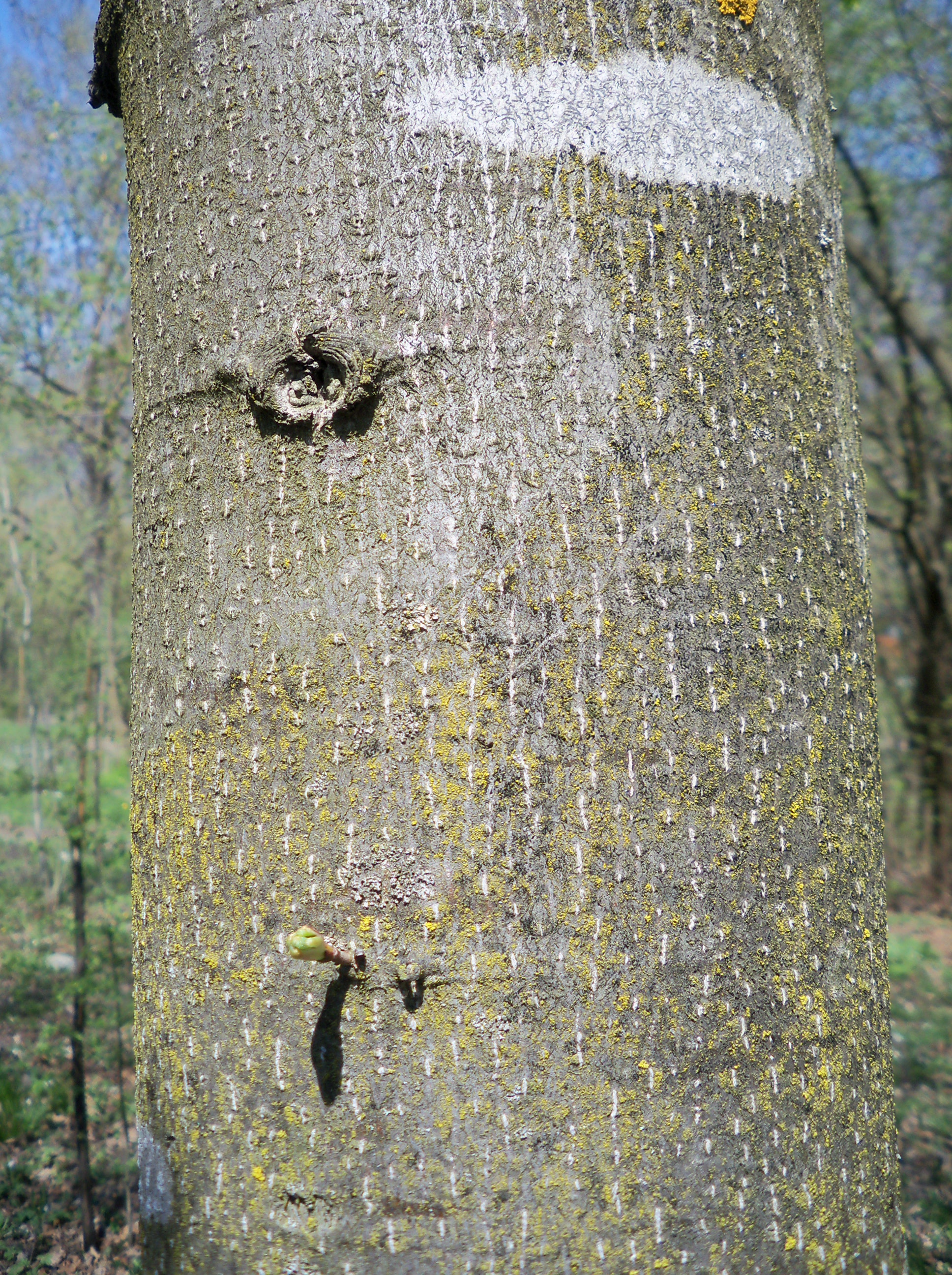 Corteccia giovanile di Tilia platyphyllos